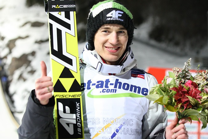 Konkurs indywidualny mężczyzn na skoczni K-120 podczas Mistrzostw Świata w Narciarstwie Klasycznym 2013